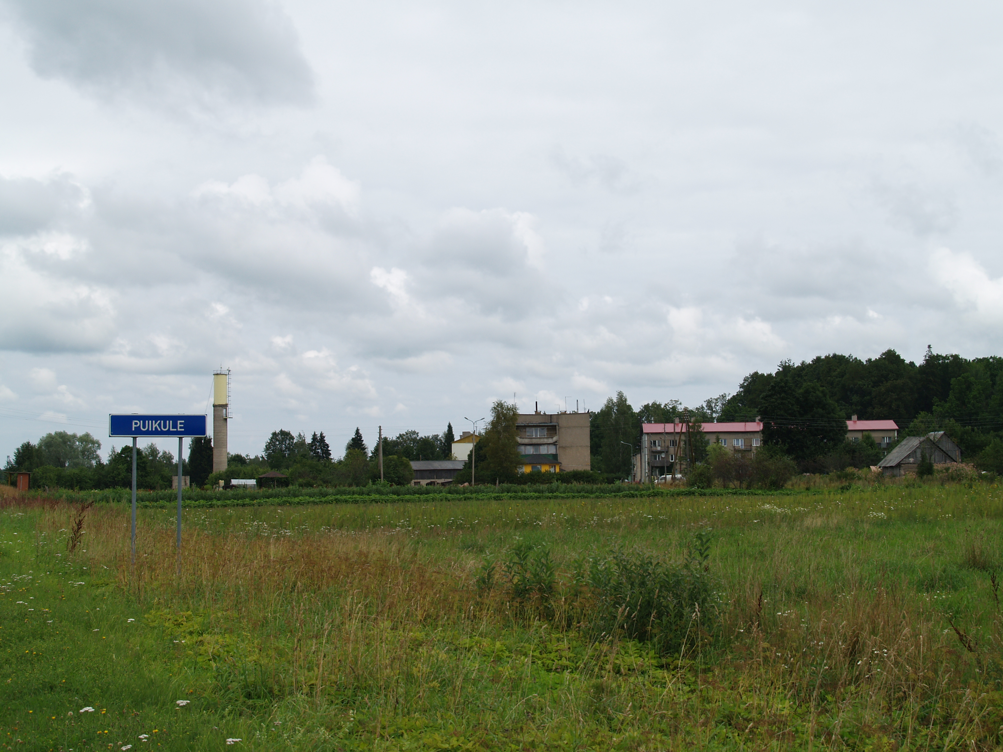 Puikule